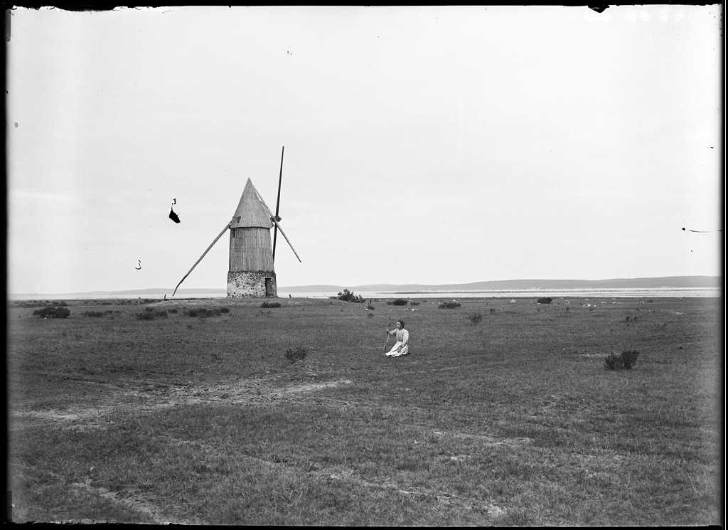 Reproduction numérique de l'œuvre Moulin à vent avec Jeanne Labat d'En-Meyri, réalisée par Félix Arnaudin à Biscarosse le 19 août 1896 selon la technique du gélatino bromure d'argent sur plaque de verre (13 x 18 cm)